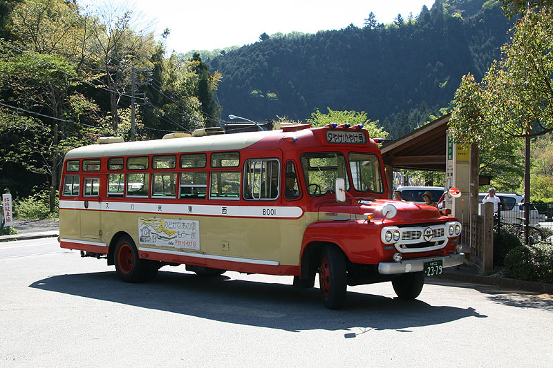 Nishitokyo Bus Co.,Ltd.'s bonnnet bus "Yuuyake-Koyake-Go" (Isuzu BXD50) stopping at Yuuyake-Koyake Busstop, Hachioji, Tokyo, Japan